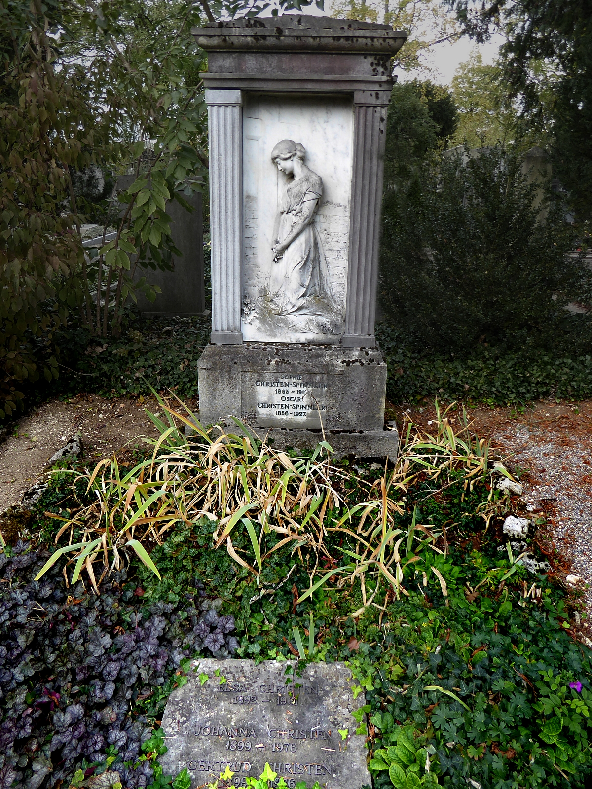 Familiengrab Christe-Spinnler, Grab auf dem Friedhof Wolfgottesacker, Basel